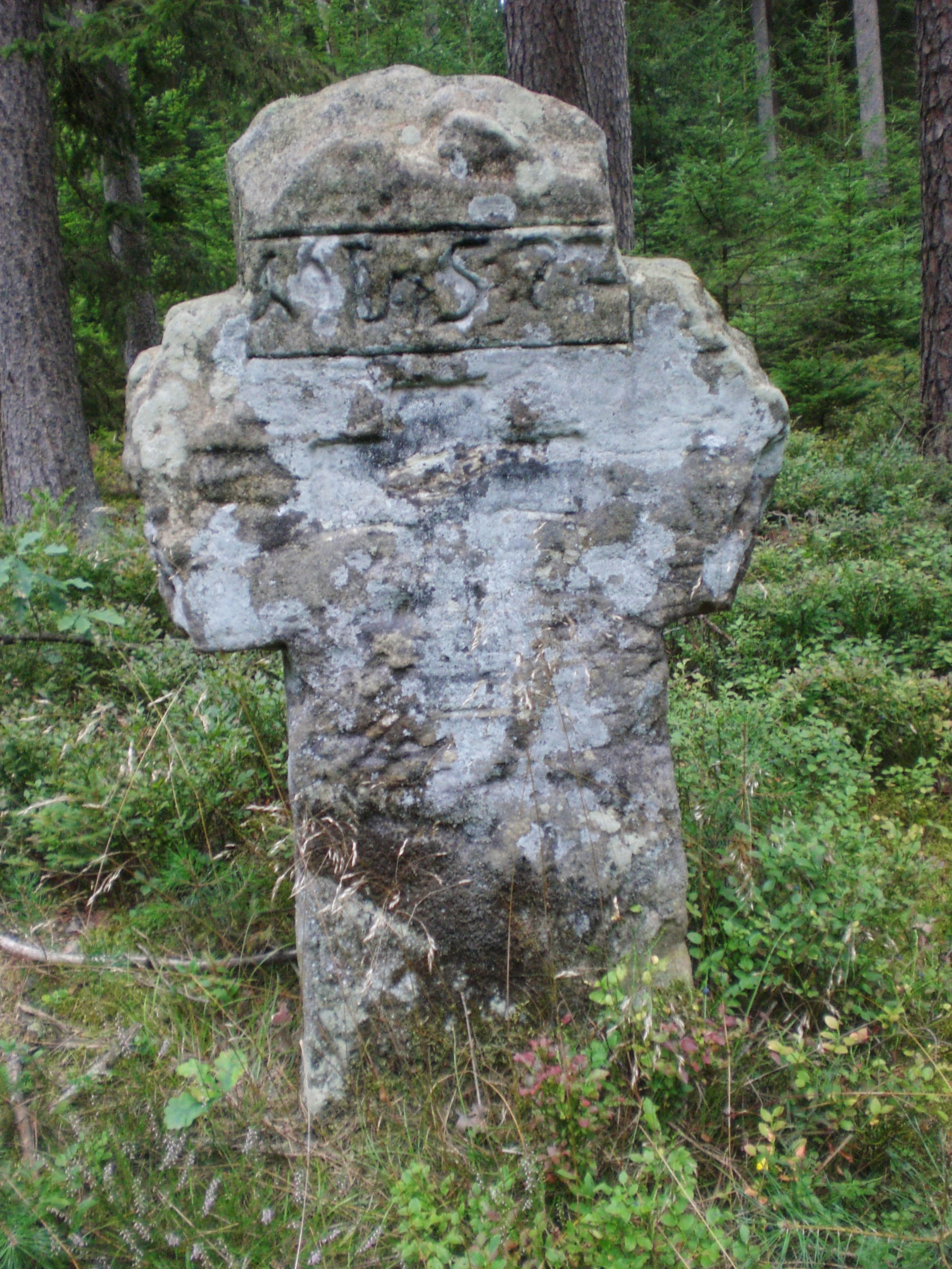 Steinkreuz nahe Weiherhaus